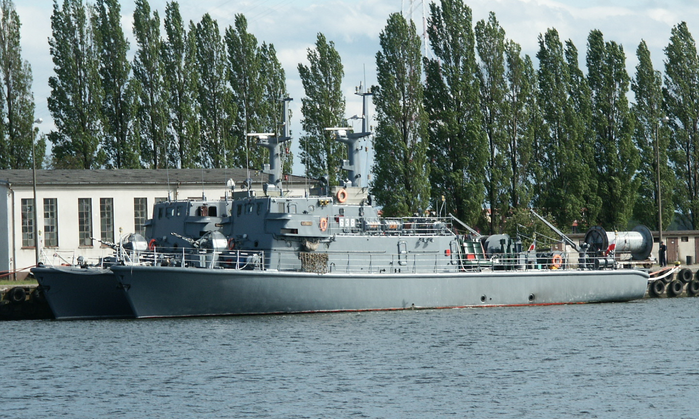 Polish minesweepers Project 207P class, in a foreground ORP Sarbsko (638), in Swinoujscie, 2004. Author: Pibwl pl: Polskie trałowce projektu 207P, na pierwszym planie ORP Sarbsko (638) w Świnoujściu, 2004. Autor: Pibwl